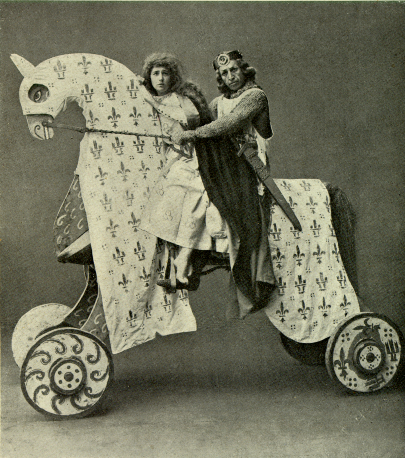 копия иллюстрации из книги "Старинный театр" - "Игра о Ребэне и Марион"